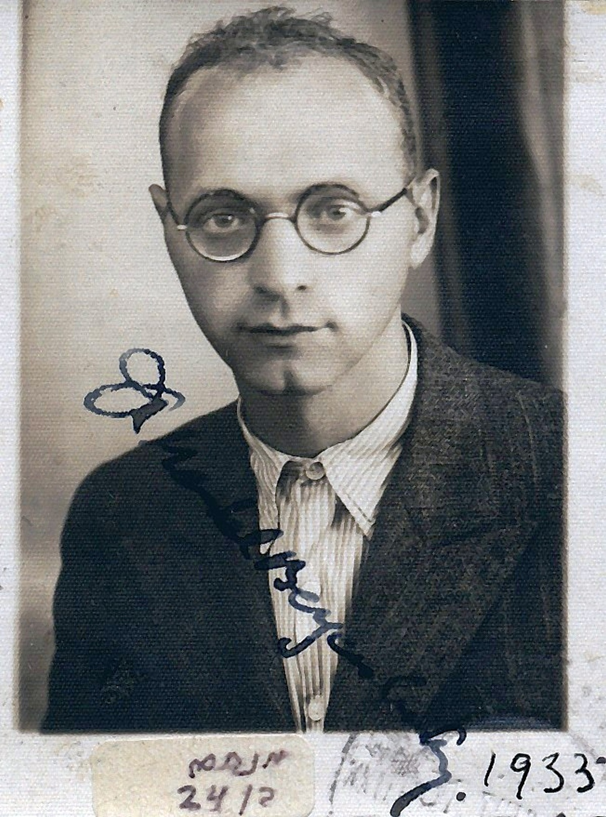 מנחם אורן מורה צעיר בגימנסיה במונקץ' בהונגריה